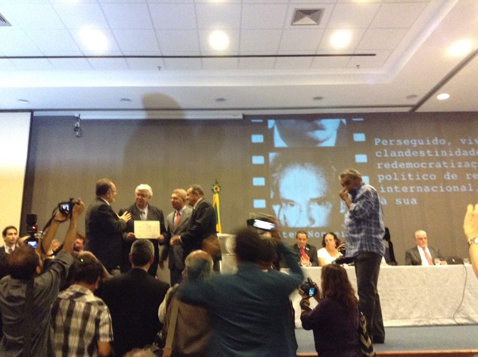 Diógenes de Almeida Campos, filho de Aristeu Nogueira, recebe documento de devolução do mandato de Deputado Estadual de seu pai, na Assembléia Legislativa da Bahia em 31 de março de 2014